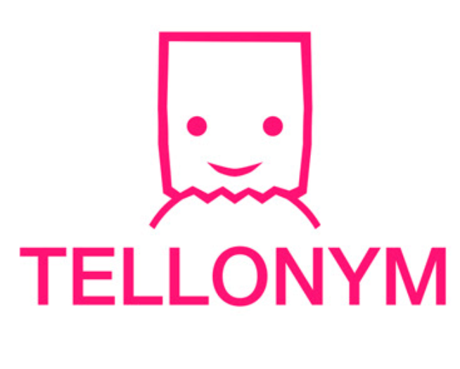 Logo dell'app Tellonym